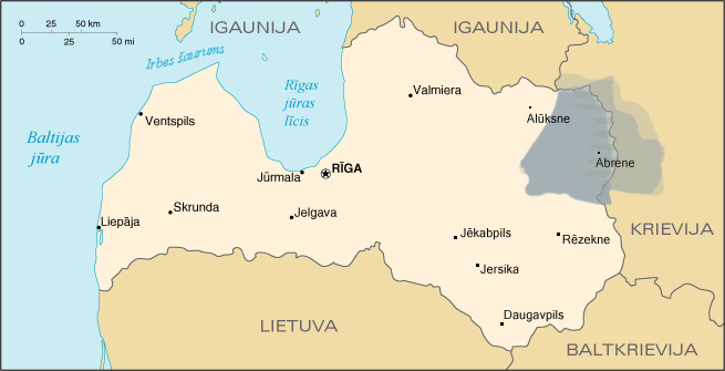 Pietālavas valsts (novada)teritorijas variācijas pēc dažādām vēstures kartēm.